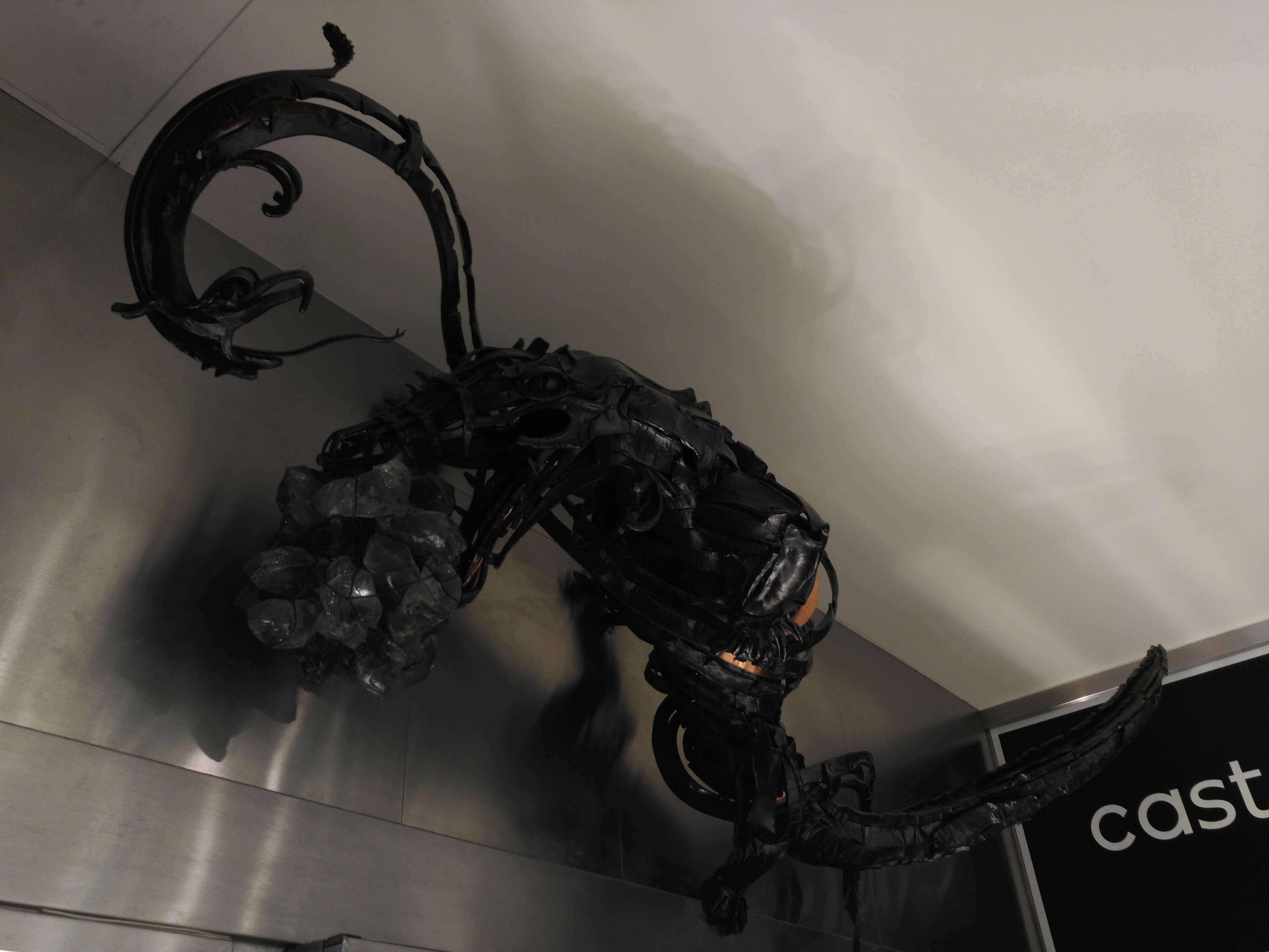 Escultura de ferro forjat representant un drac realitzada per Rafel Codina i que es pot veure a la sabateria Castellsaguer de Mataró